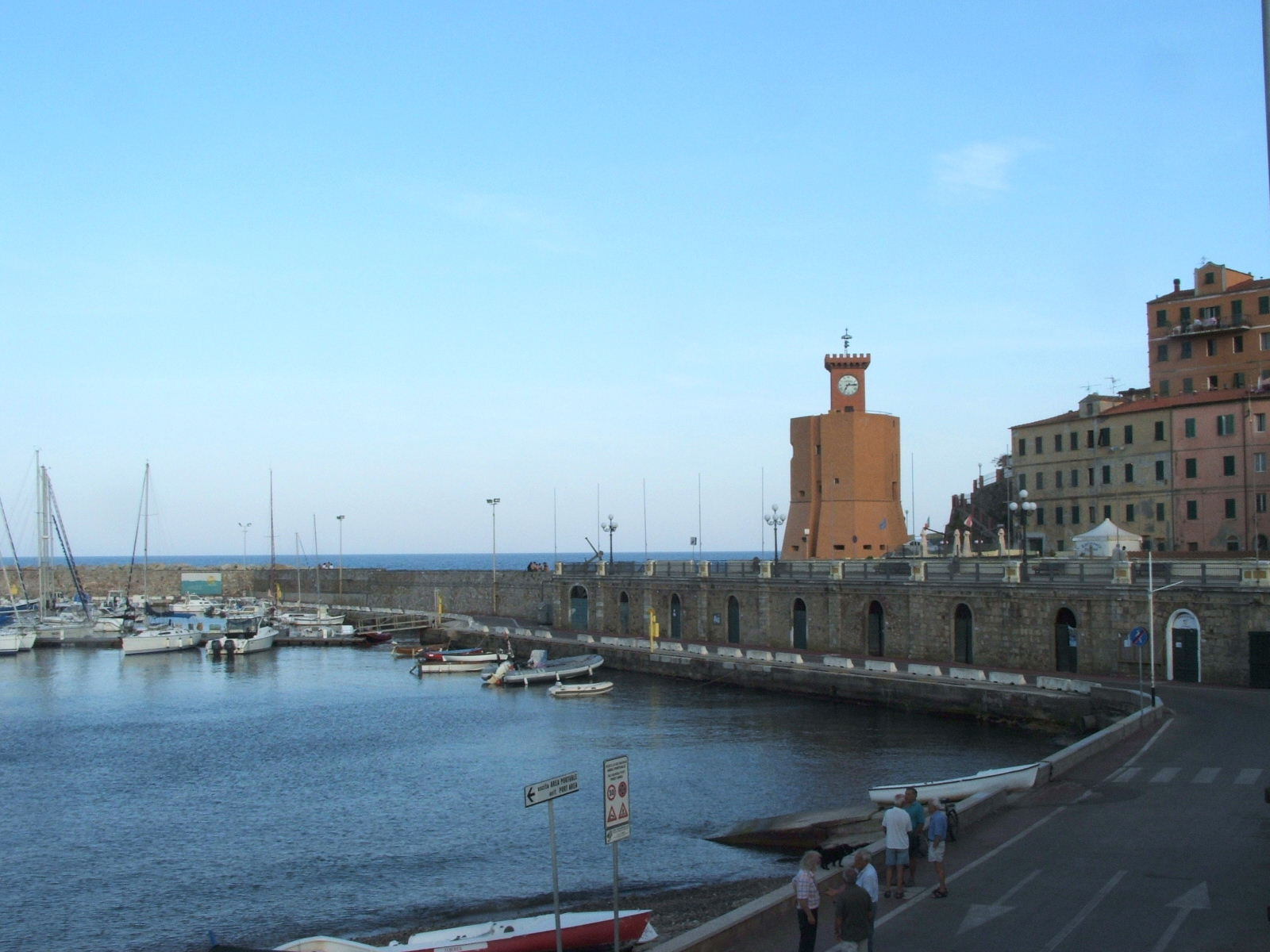 Immagine da Rio Marina